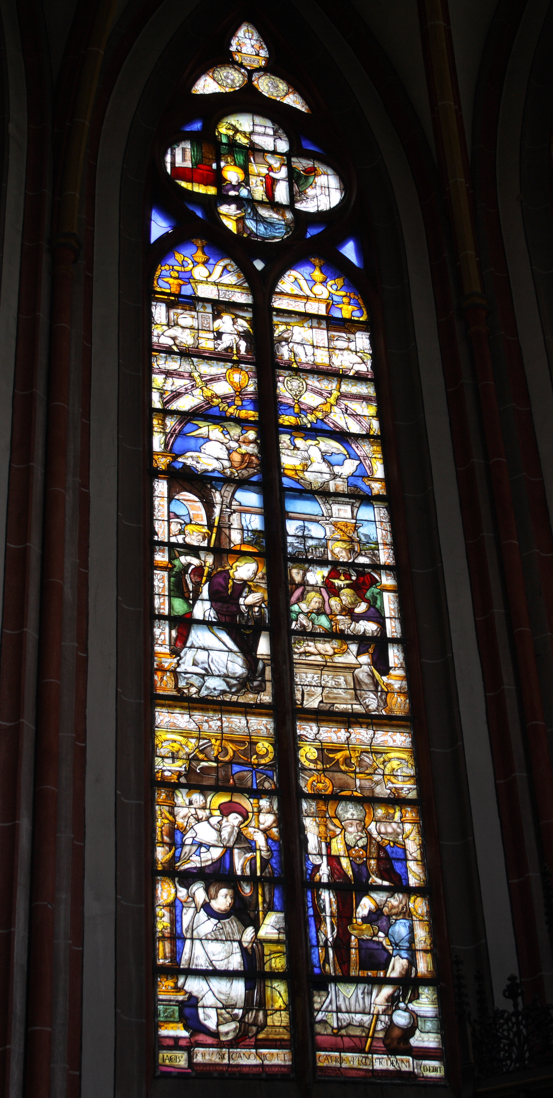 Katholische Pfarrkirche, ehemalige Stiftskirche Unsere Liebe Frau (Mariä Himmelfahrt) in Kyllburg im Eifelkreis Bitburg-Prüm (Rheinland-Pfalz), Bleiglasfenster im Chor, von 1533/34; Darstellung: Anbetung des Jesuskindes, unten links: Antonius der Große und der Stifter Jacobus, ein Kyllburger Kanoniker; unten rechts: hl. Nikolaus und ein Bettler; im Vierpass: Verkündigung